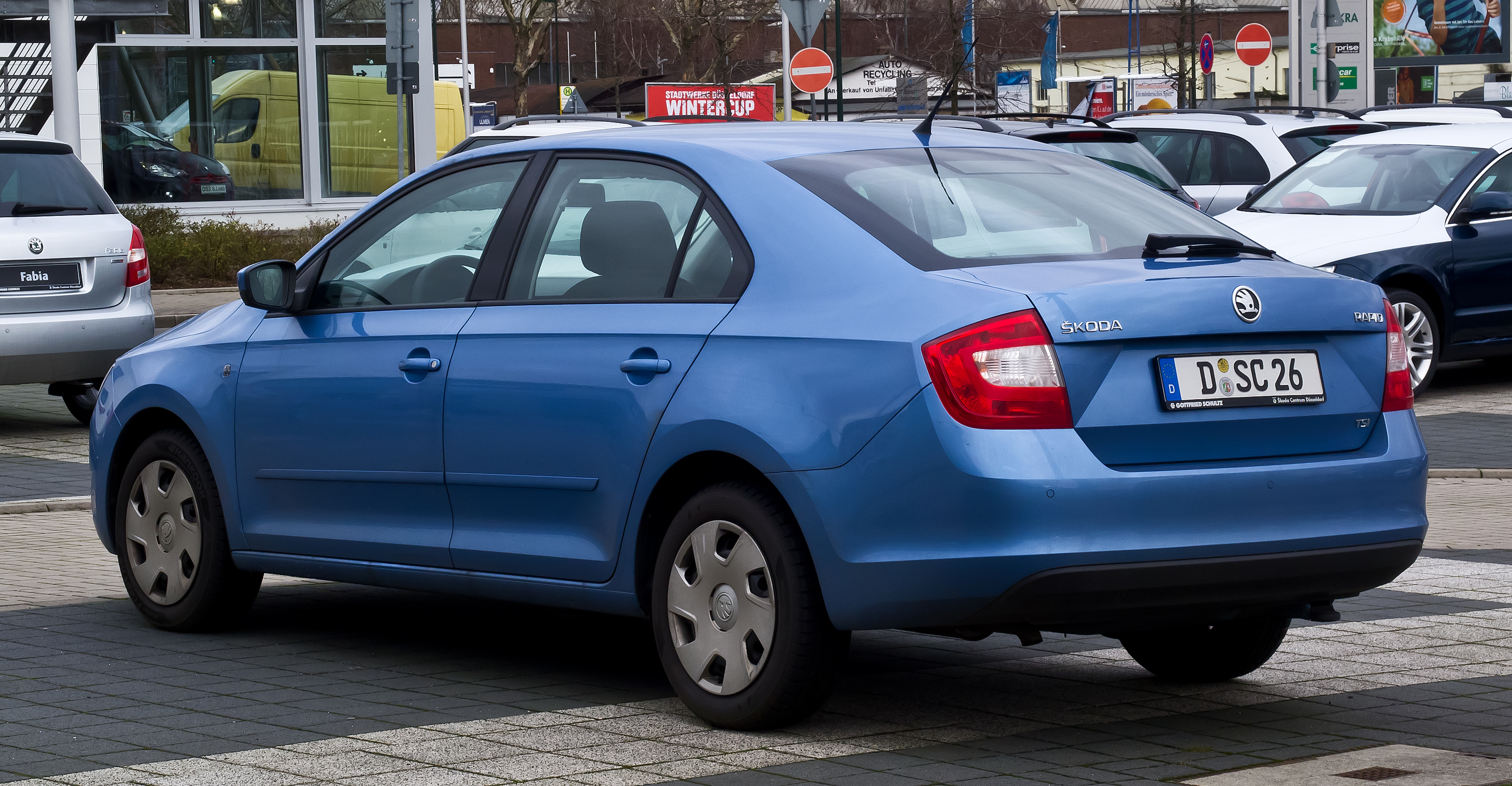 Skoda Rapid 1.2 TSI Ambition